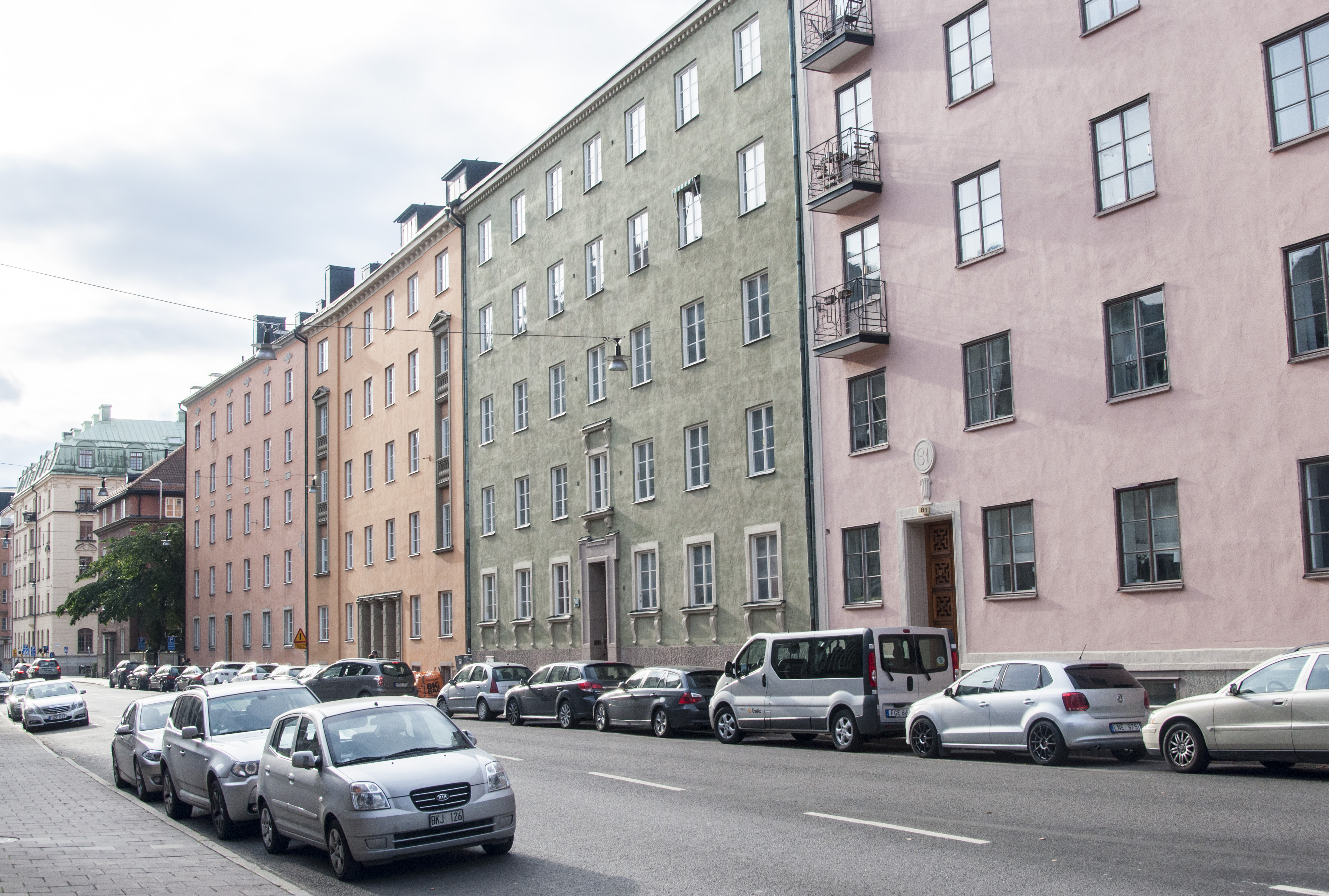 Kv. Ripan, Stockholm utmed Artillerigatan